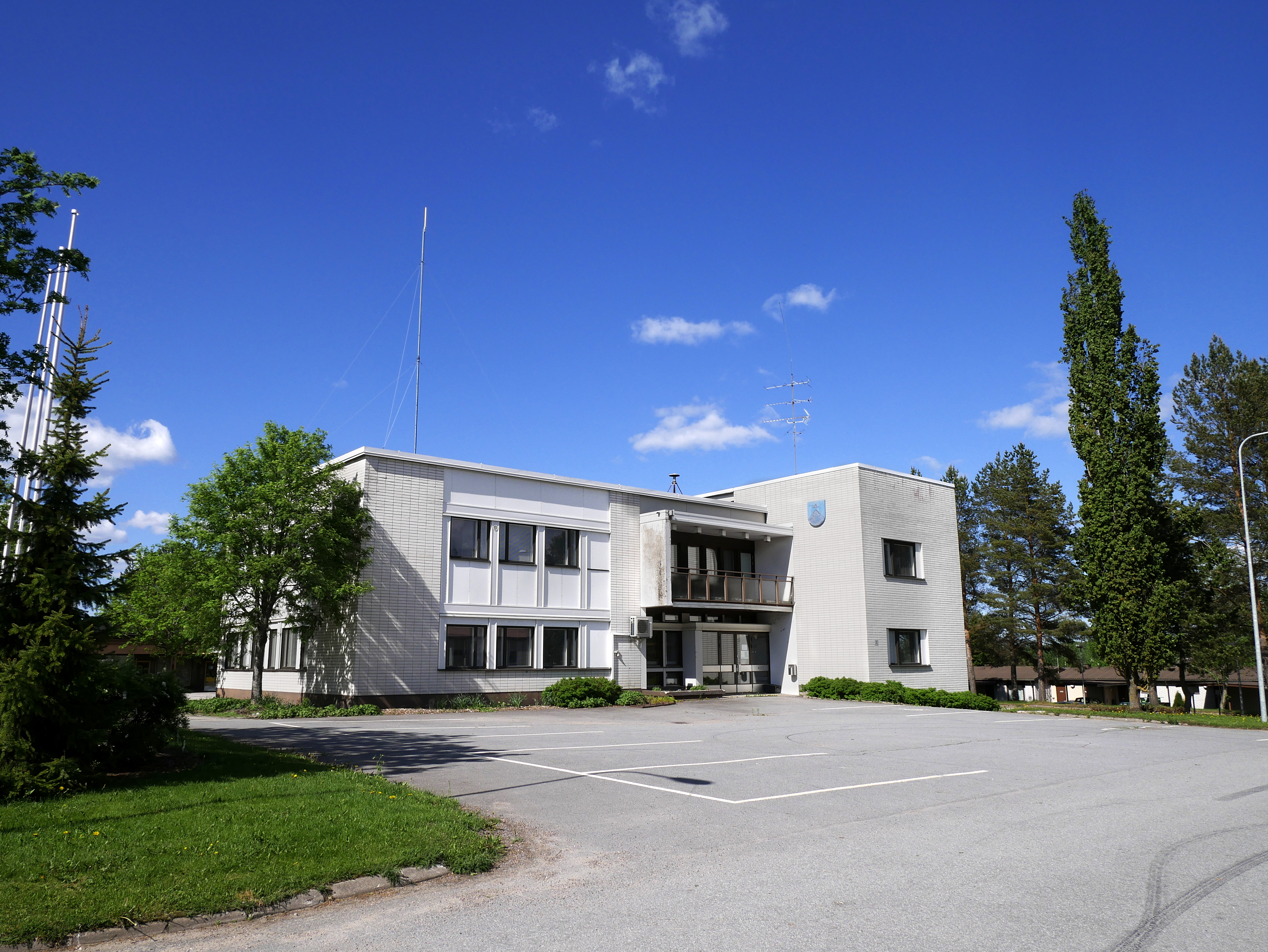 Töysä talo.